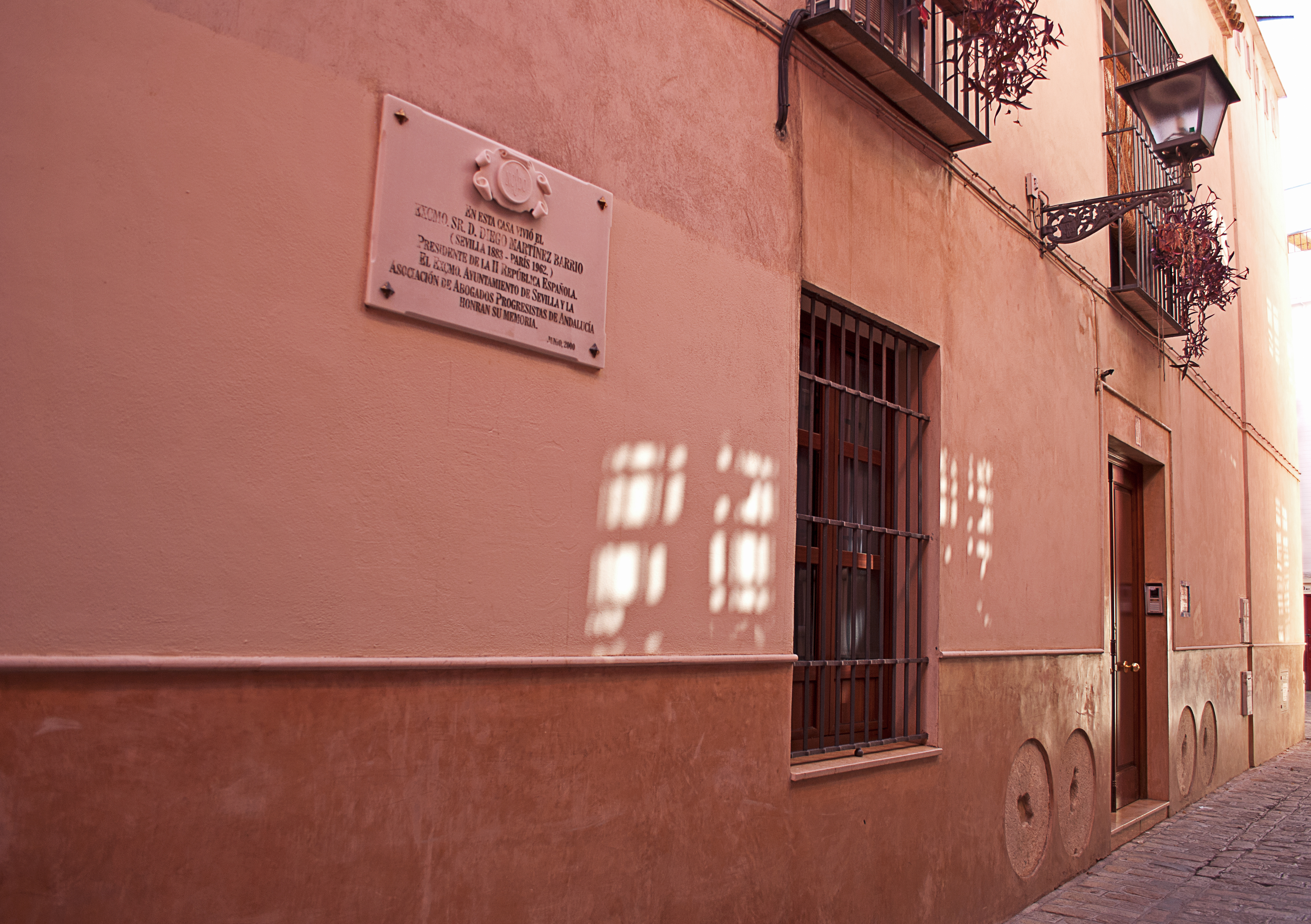 Casa donde vivió Diego Martínez Barrios, calle Lirio, Sevilla.